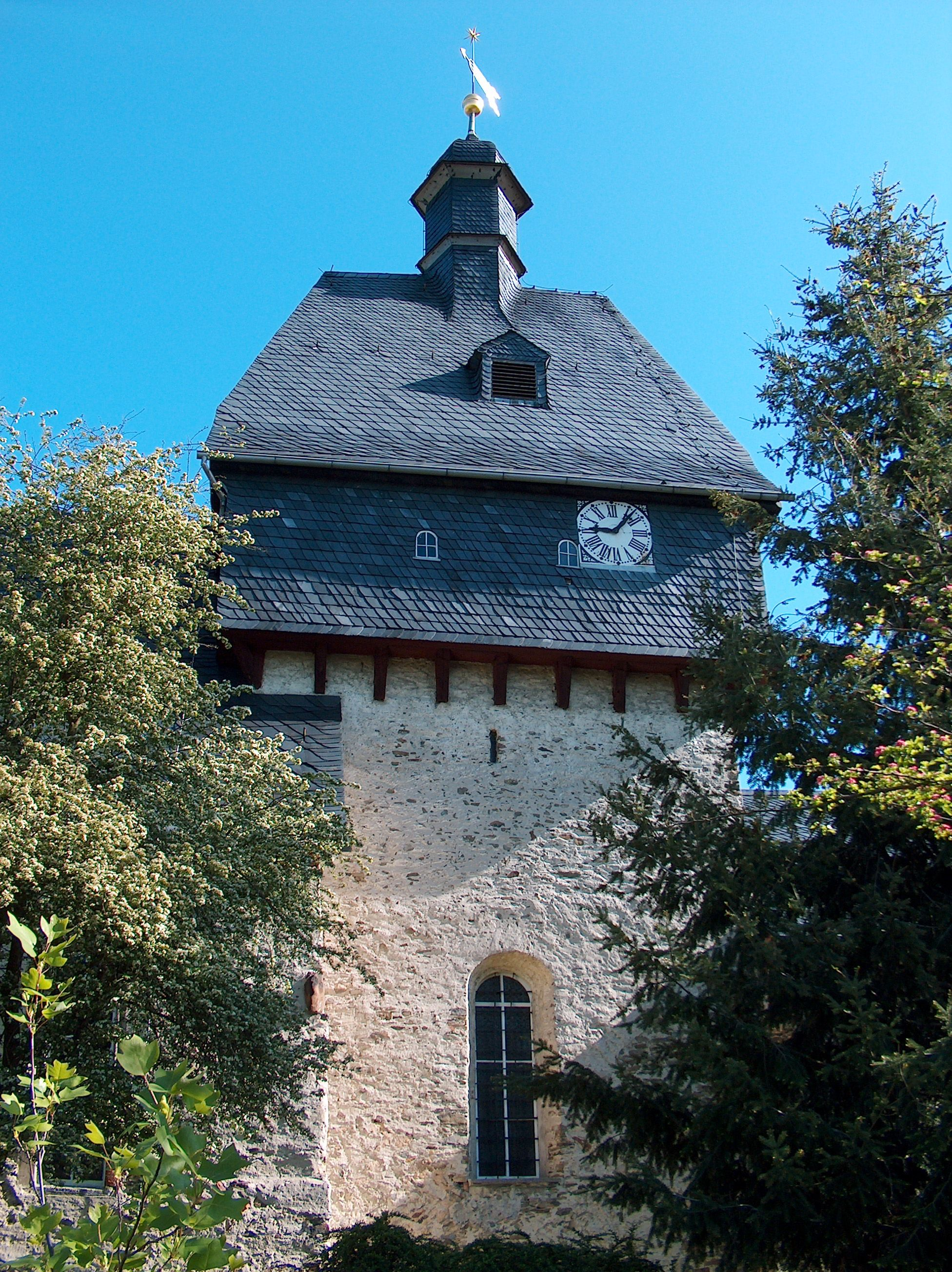 Turm der Wehrkriche in Friesau